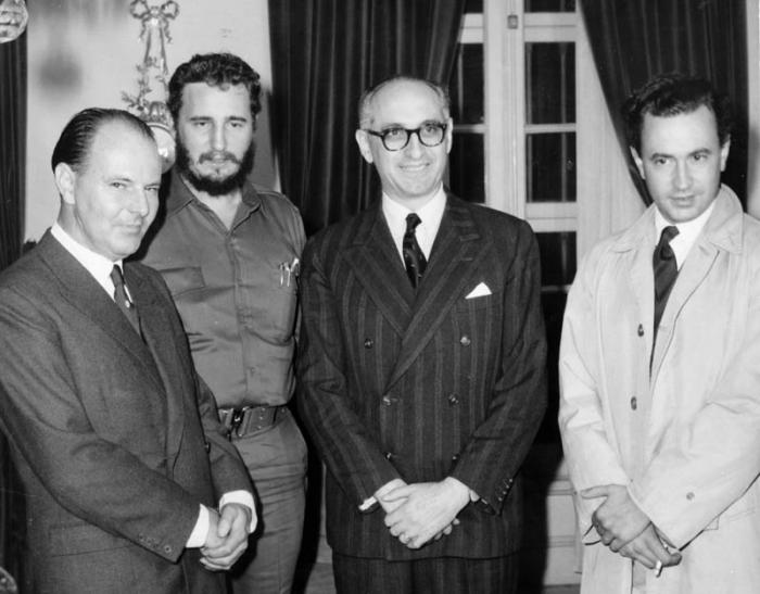 Fidel Castro de visita extra oficial en Buenos Aires, 1959.